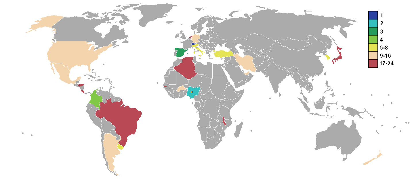 Status van de teams die deelnemen aan het Onder 17 WK 2009 in Nigeria. De landen in licht-blauw kunnen nog Wereld Kampioen worden.